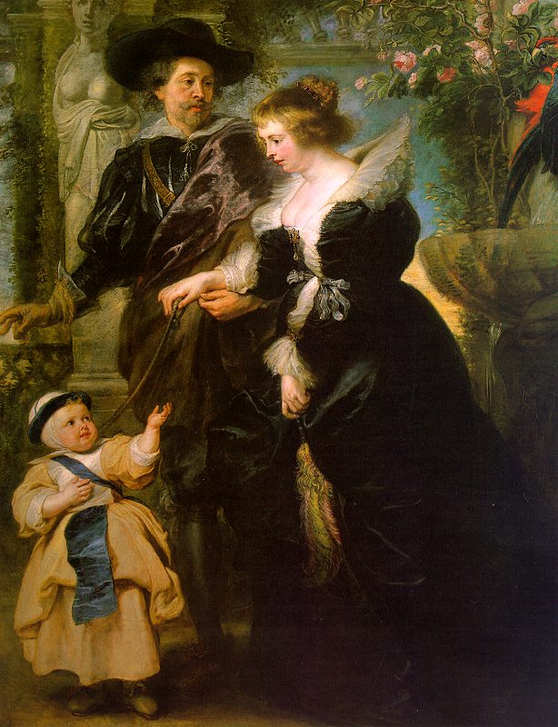 Der Künstler mit seiner Frau Hélène Fourment und ihrem Sohn Peter Paul